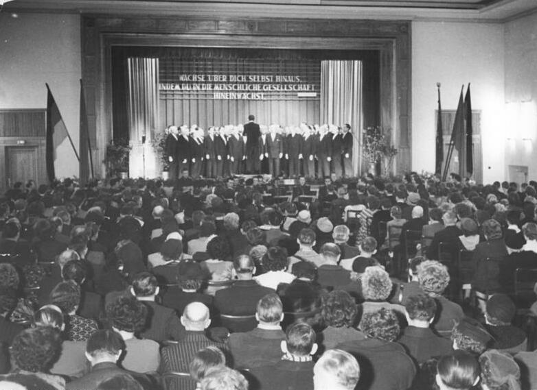 Berlin, Jugendweihe, Feierstunde Zentralbild Weiß 18.3.1956 Die ersten Jugendweihen des Jahres 1956 in Berlin Die ersten Jugendweihen des Jahres 1956 im demokratischen Sektor von Groß-Berlin fanden am 18.3.1956 im Kultursaal des volkseigenen Betriebes Berliner Metallhütten und Halbzeugwerke statt. Zu den 88 (acht acht) Jugendlichen aus Schulen des Ortsteiles Adlerhof sprach Nationalpreisträger Kurt Bartel (Kuba). UBz: Blick in den Kultursaal während der Feierlichkeit.